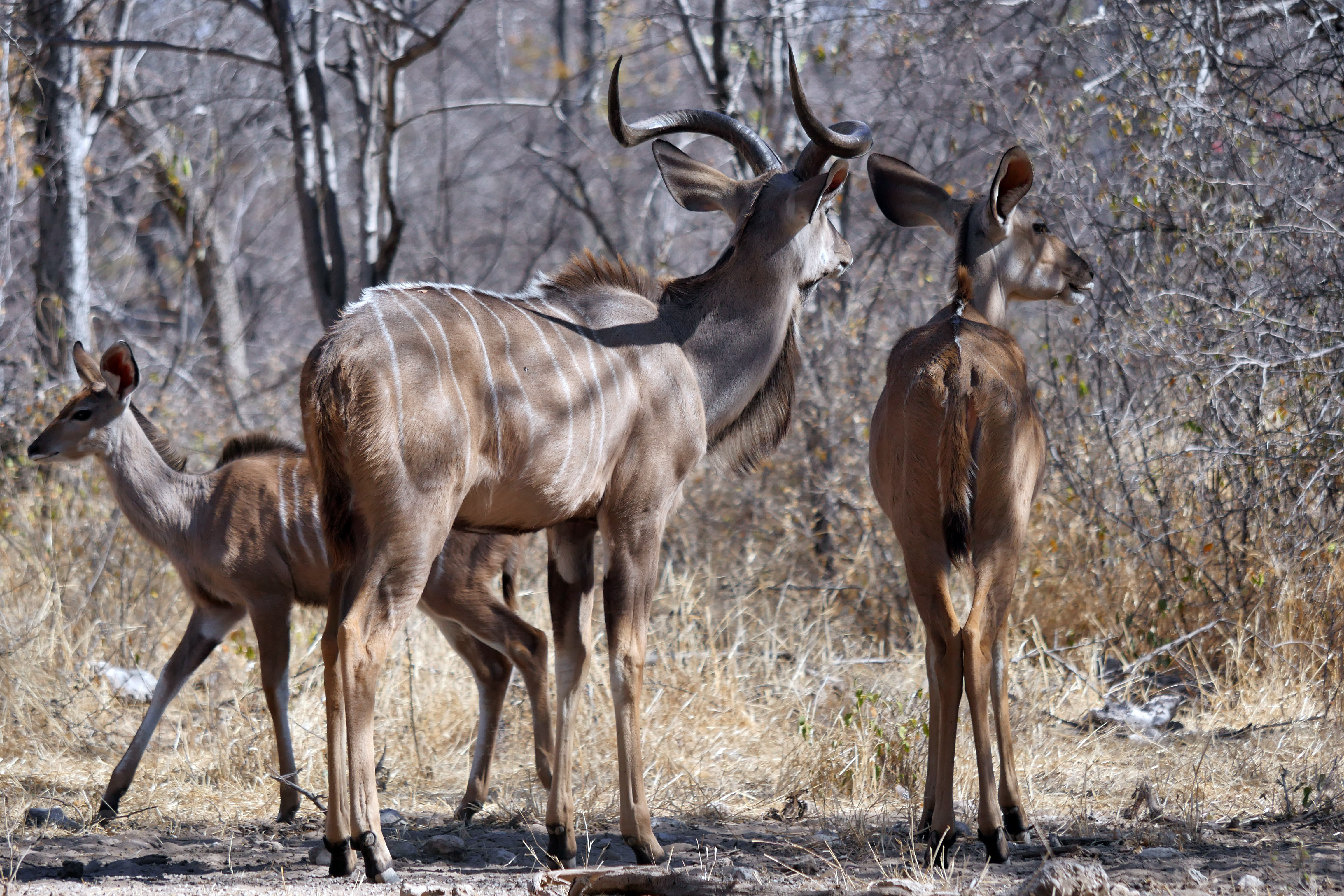 Kudu-Familie